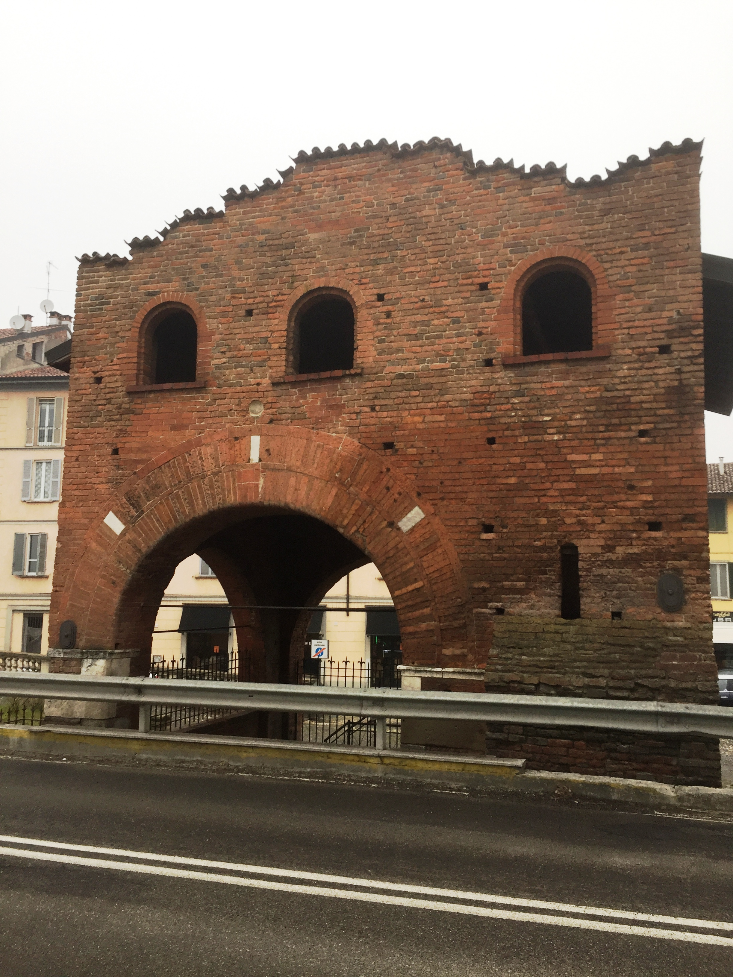 Pavia, la duecentesca Porta Nuova